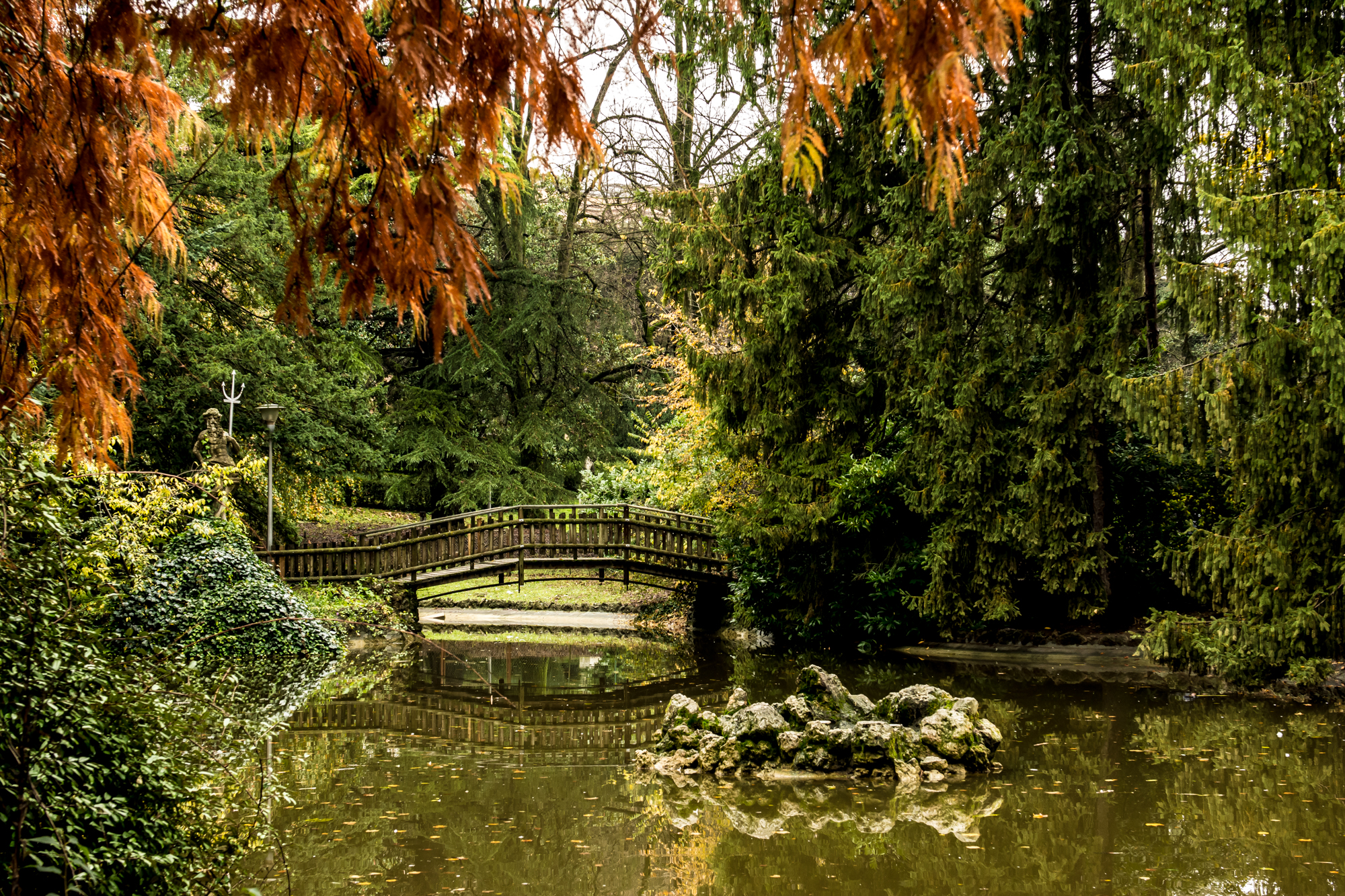 Parco Mazzini This is a photo of a monument which is part of cultural heritage of Italy.